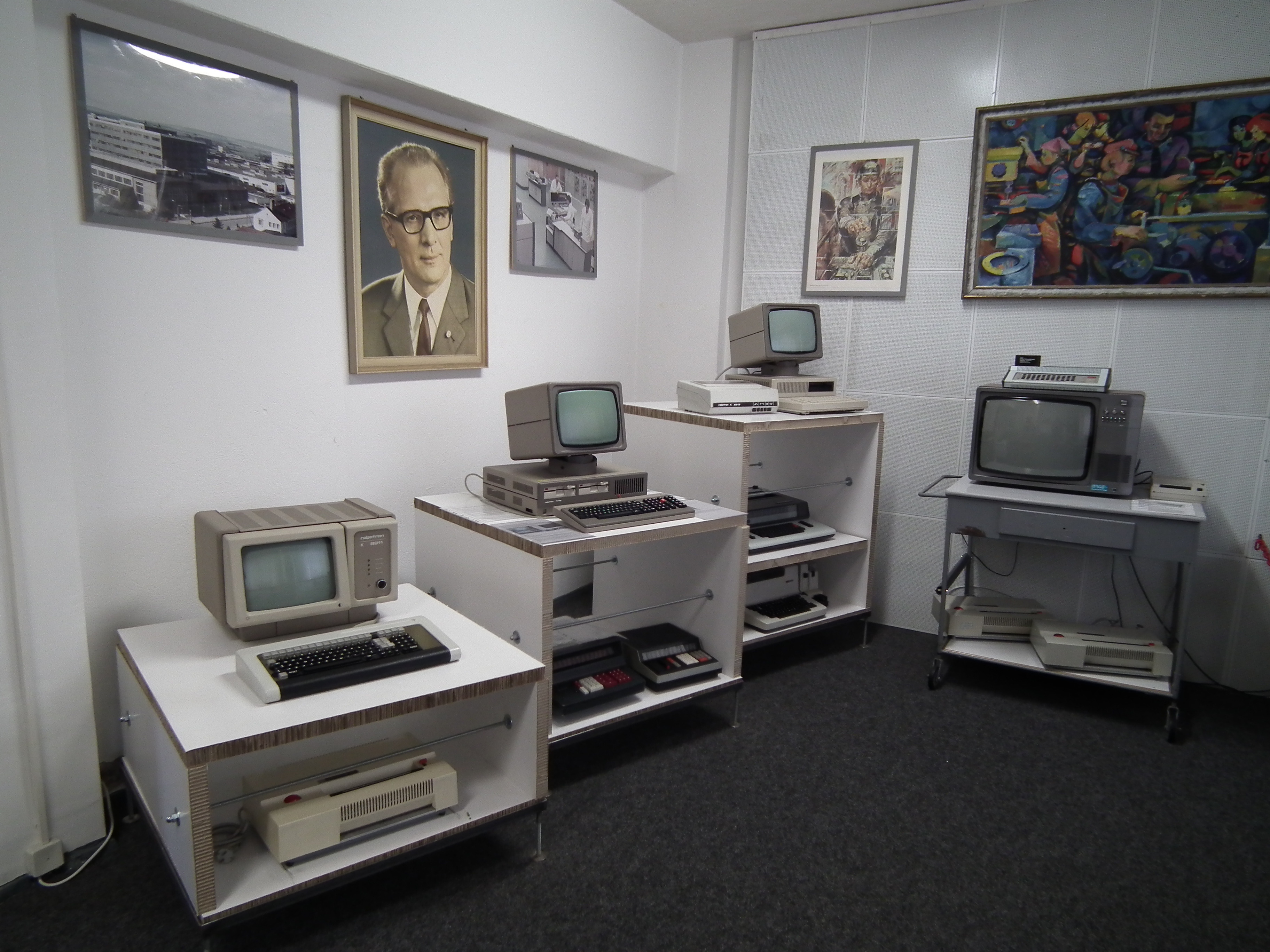 DDR-Museum Zeitreise in Radebeul, Robotron-Computer (K 8911 Terminal, PC 1715, ???, ??? (Z9001/KC85/KC87)